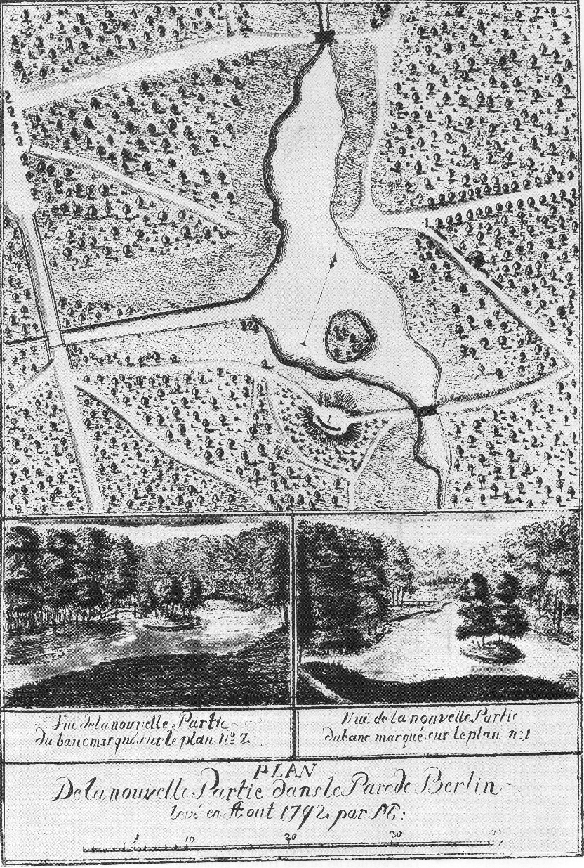 "Plan De la nouvelle Partie dans le Parc de Berlin", the "Neue Partie" in Tiergarten park in Berlin in 1792